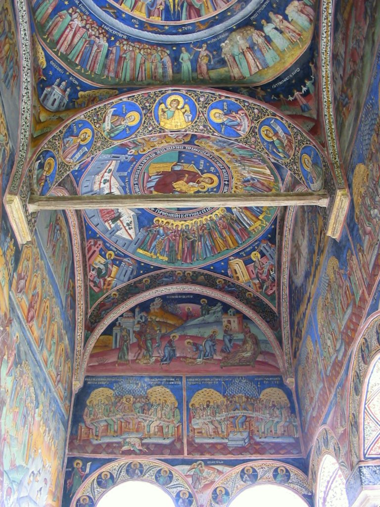 Monasterio de Horezu, Rumanía. Pinturas del atrio.